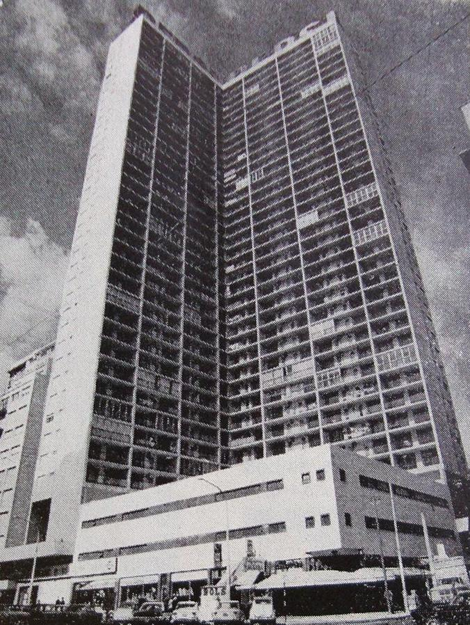 El Palacio Cosmos, en el Av. Colón y calle Sarmiento. Ciudad de Mar del Plata, provincia de Buenos Aires, Argentina. Uno de los edificios más altos de Argentina en su momento (119 metros), es conocido como Edificio Pepsi porque tuvo el logo de la empresa en su azotea por años.